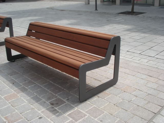 Eine Sitzbank im Stil der Modernen Architektur